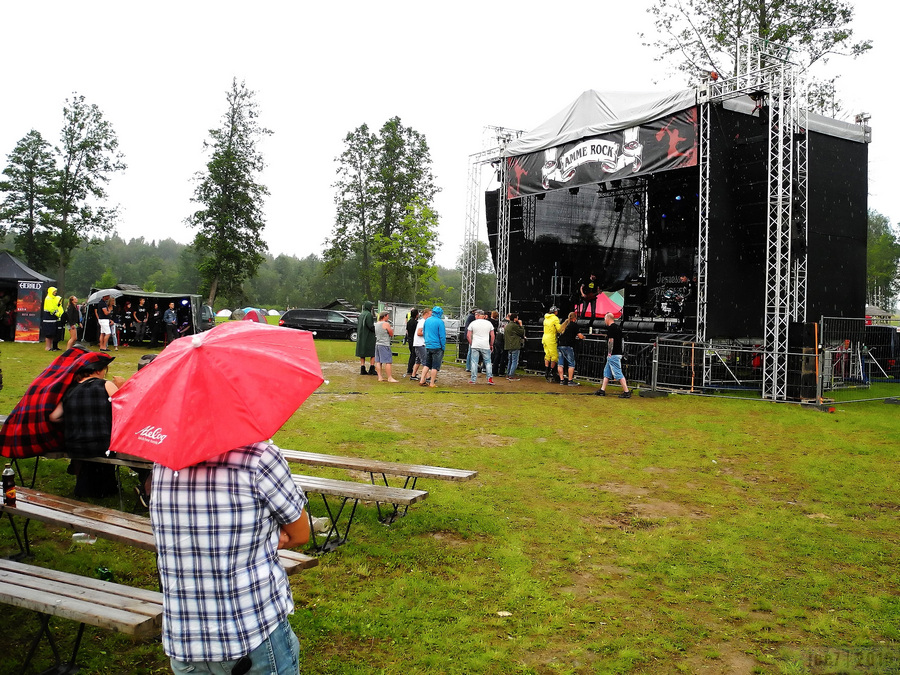 Muusikafestivali Amme Rock 2016 lava ja külastajad. Esineb Nyrok City.